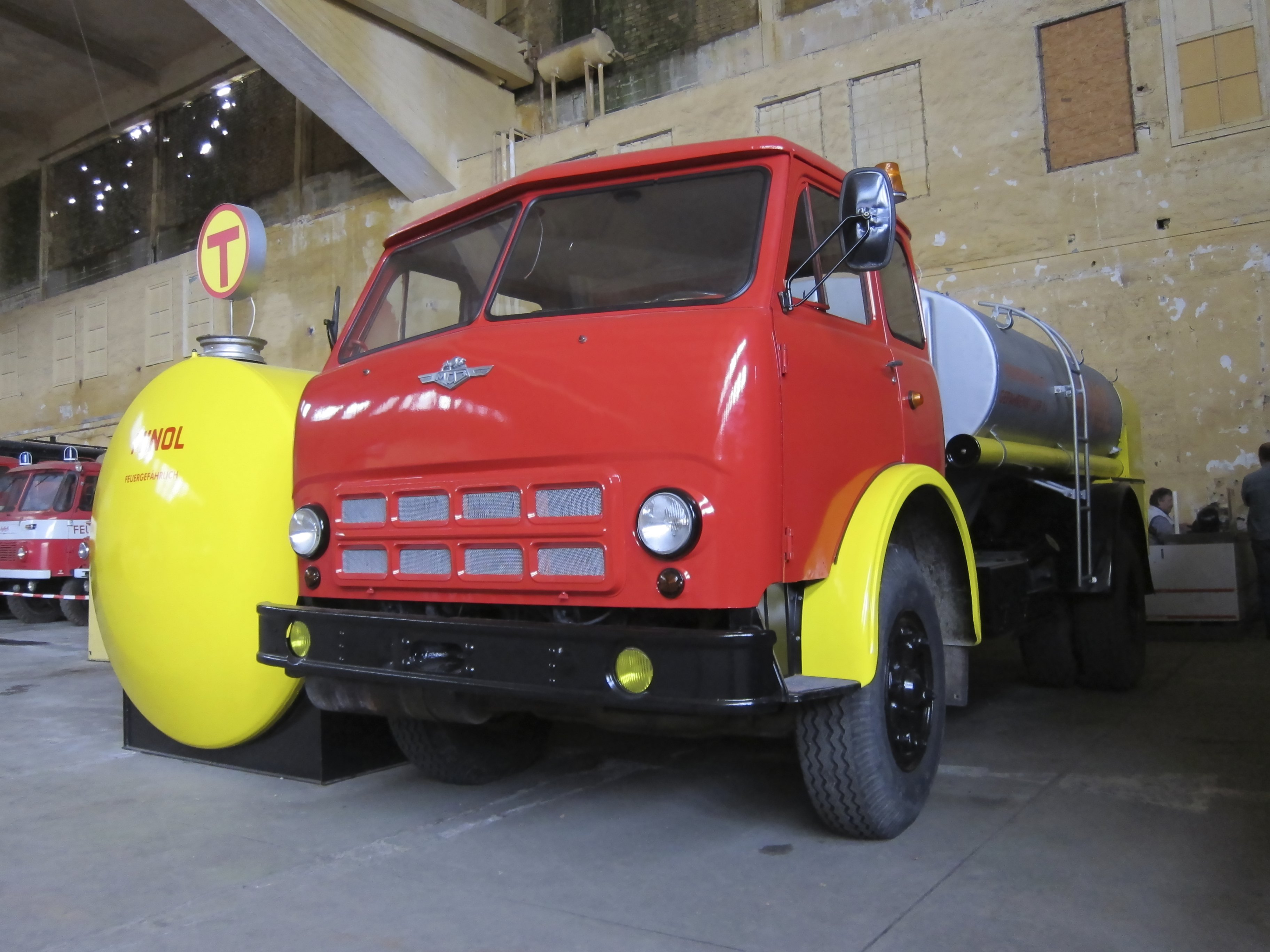 Technik Museum Pütnitz